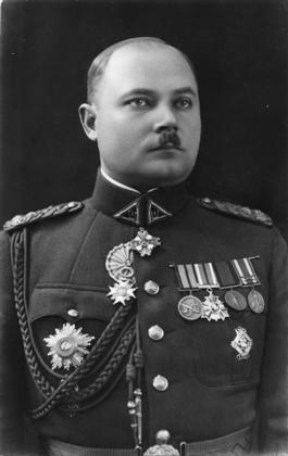 Йонас Чєрнюс